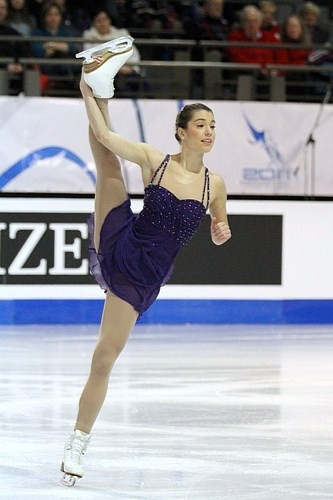 Алисса Чизни финале Гран-при по фигурному катанию сезона 2011-2012